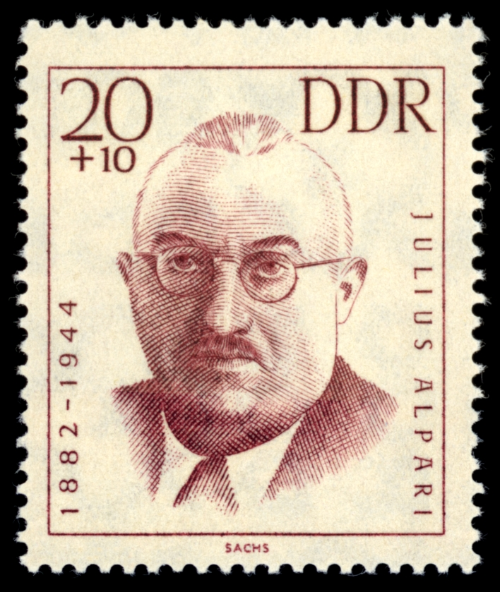 Information: Ausgabepreis: Pfennig First Day of Issue / Erstausgabetag: Auflage: Entwurf: Druckverfahren: Michel-Katalog-Nr: Ländercode-MiNr